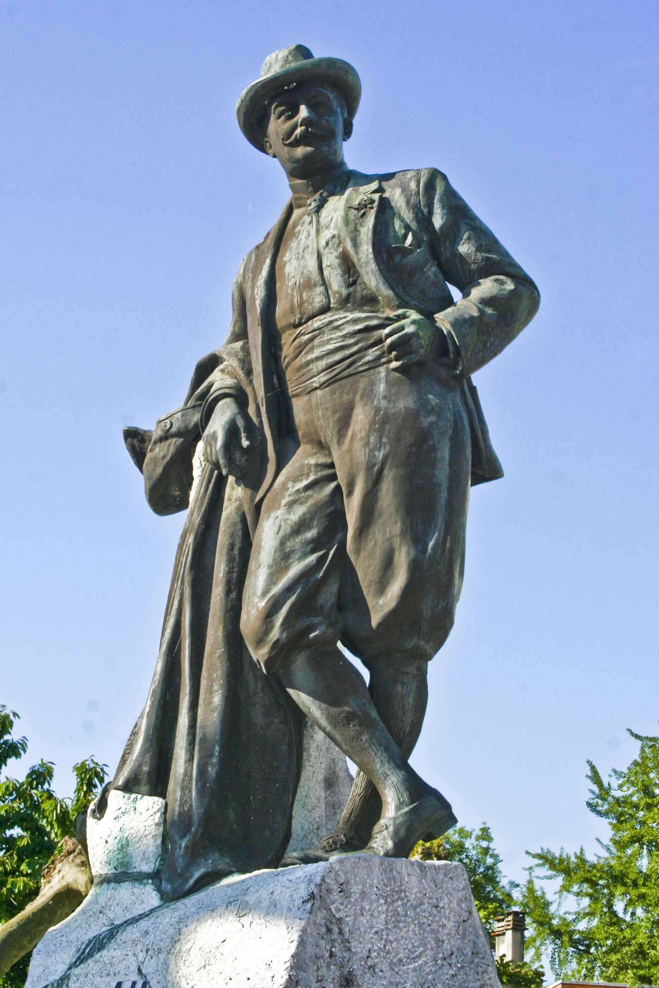 Statue du baron Bertrand de Lassus, par Montorgue, Montréjeau (Haute-Garonne, France)